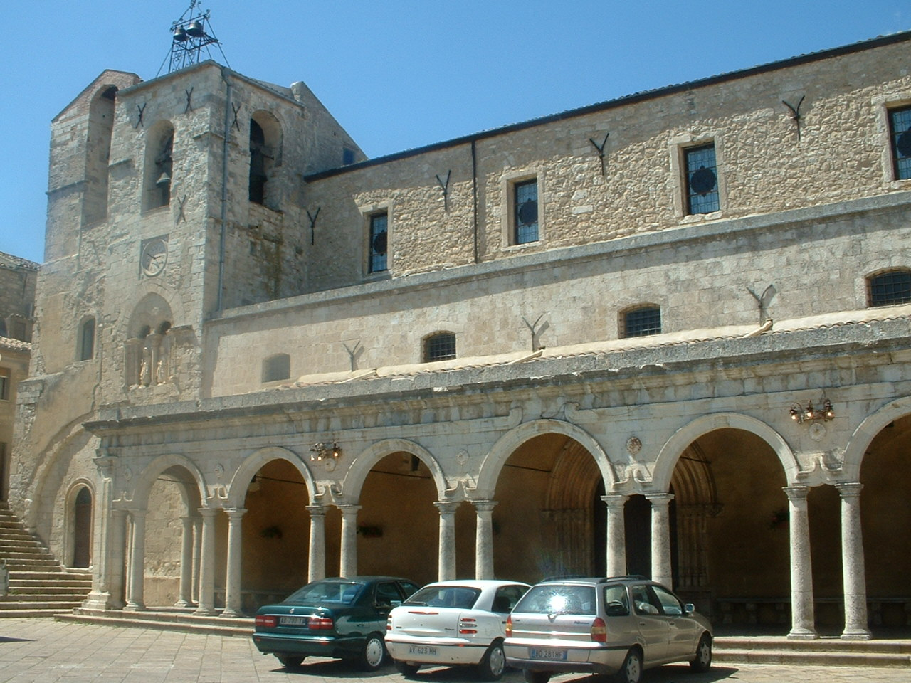 Petralia Soprana (PA), Chiesa madre SS. Pietro e Paolo (XV-XVIII sec.)